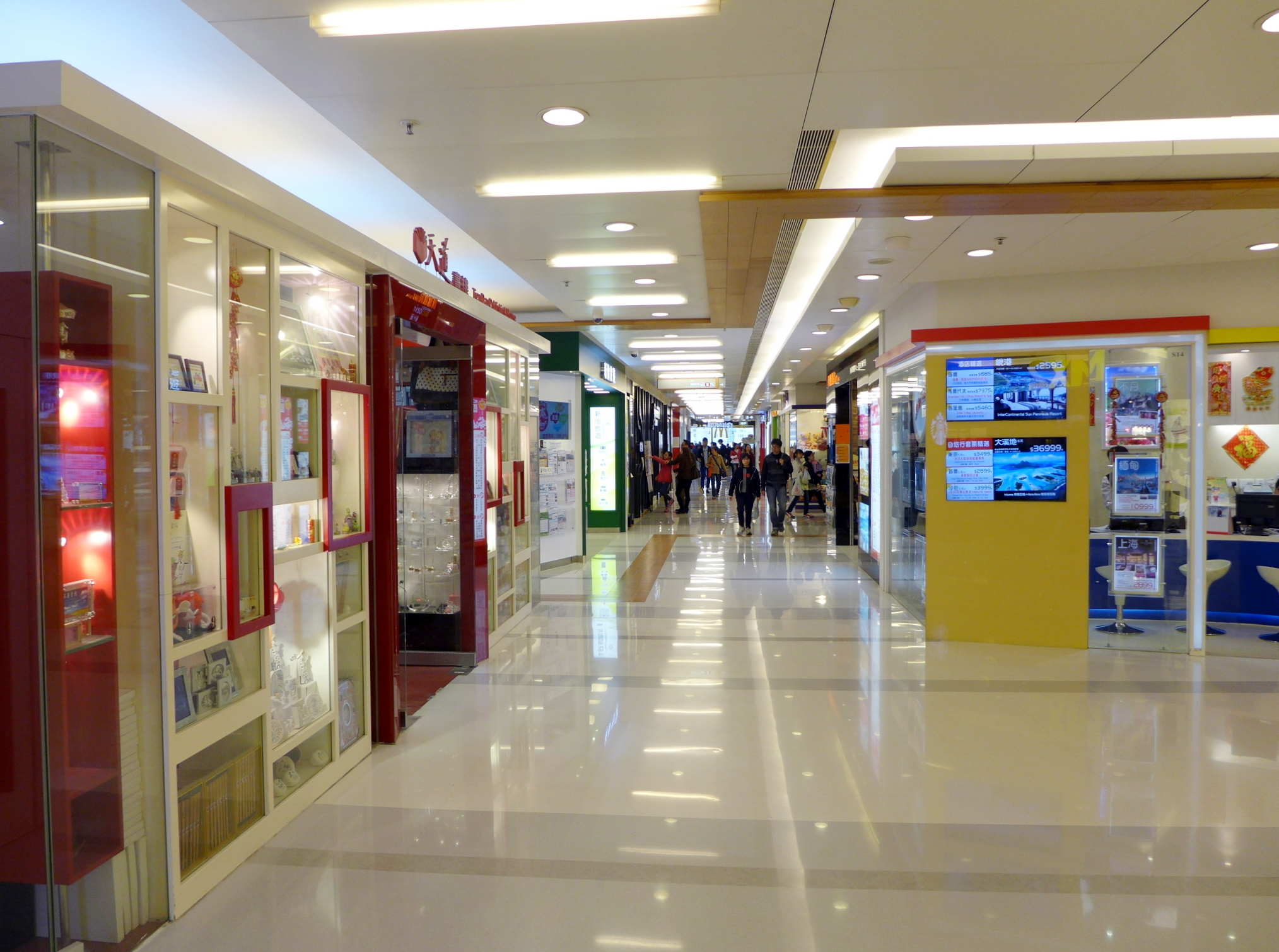 Luk Yeung Galleria Shops